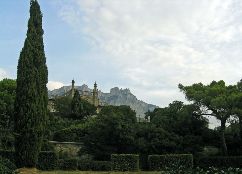 Воронцовский дворец. Панорама Ай-Петри.